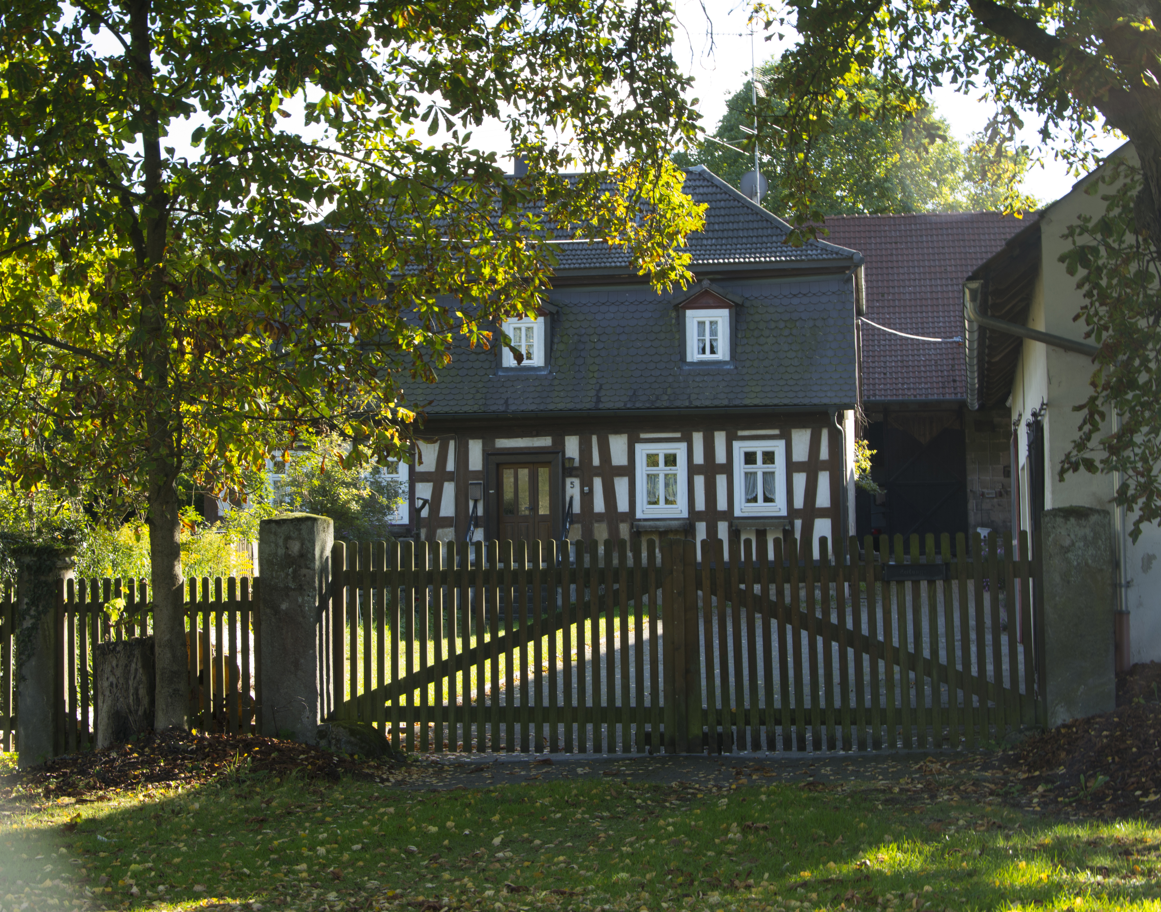 Fachwerkhaus mitten im OrtThis is a photograph of an architectural monument.